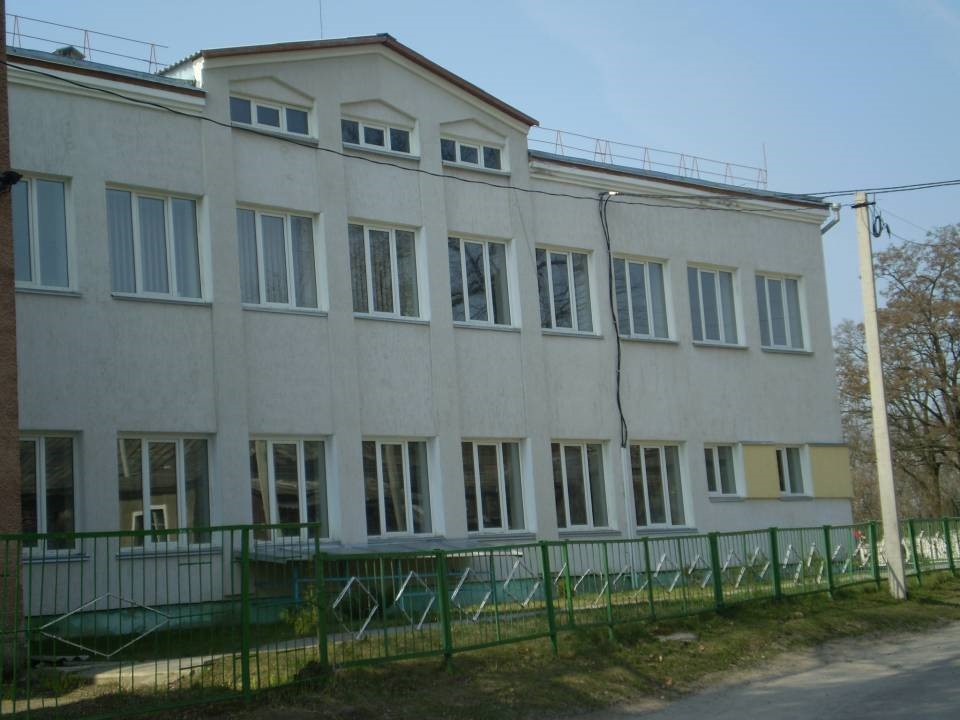 На знімку Володимир-Волинська ЗОШ І-ІІІ ст. №1